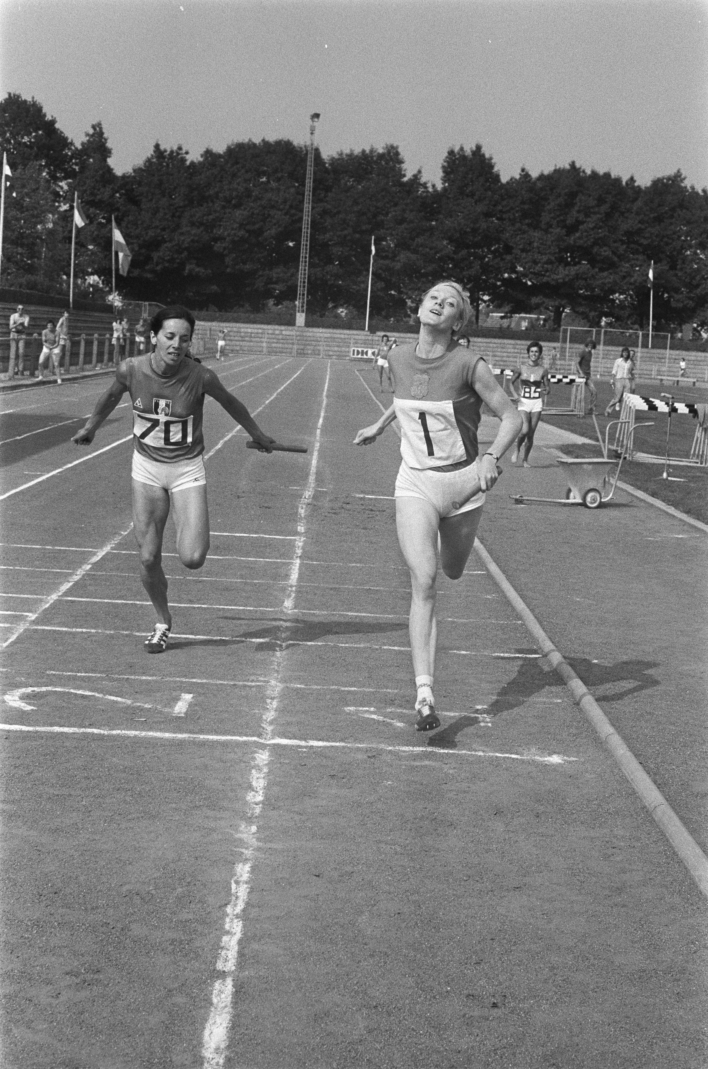 Athlétisme : Pays-Bas, Roumanie, France dames à Uden (Pays-Bas). Photographie de l'arrivée du relais 4 x 400 mètres, ici Colette Besson (à gauche) et Corrie Bakker, par Bert Verhoeff / Anefo.